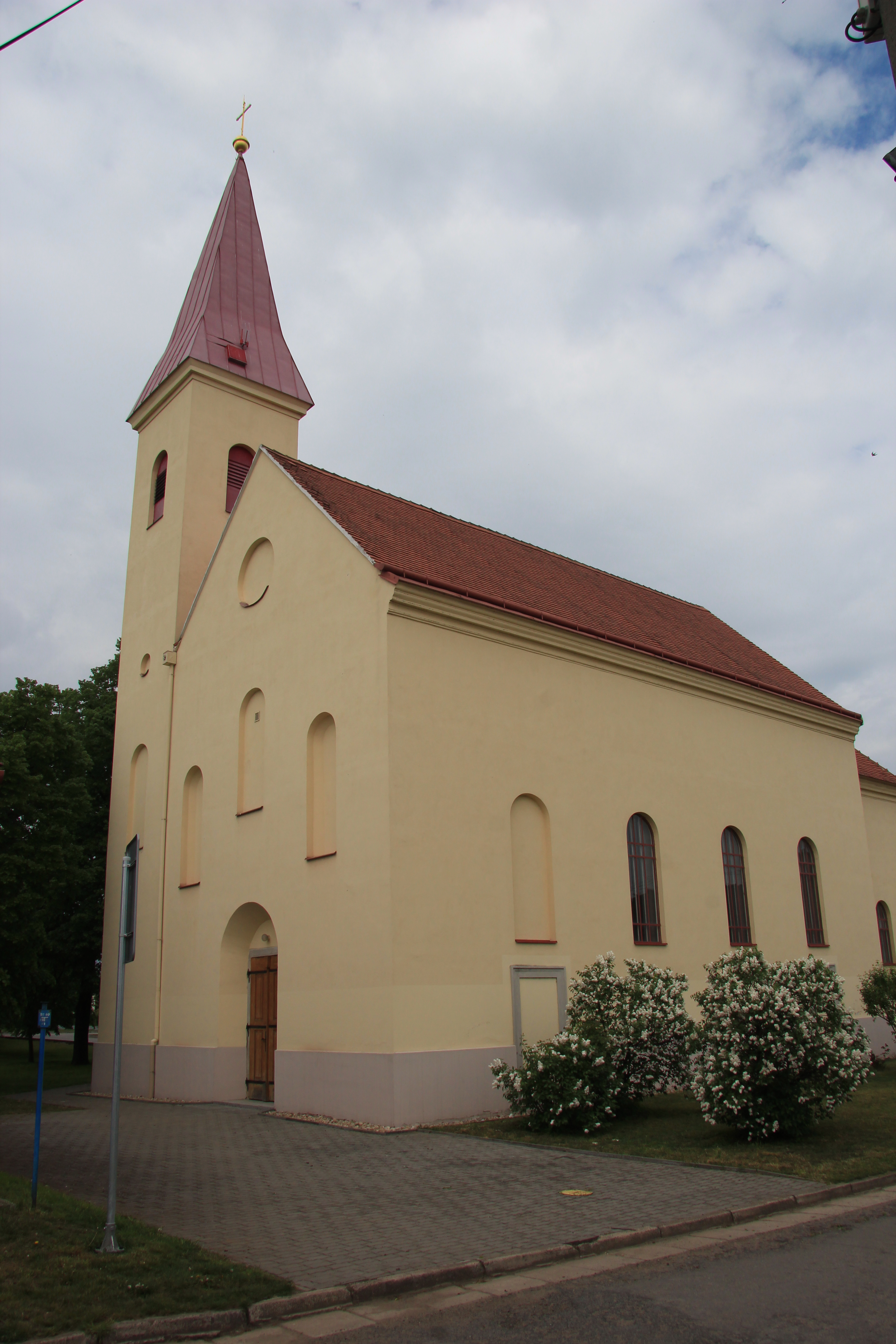 Kirche in Čekovice, Südmähren